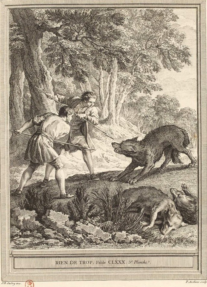 Gravure réalisée par Pierre-Alexandre Aveline d'après un dessin de Jean-Baptiste Oudry représentant la fable Rien de trop de Jean de La Fontaine (fable 11 du livre IX). Cette gravure est parue dans l'édition complète des fables de La Fontaine, parue en quatre tomes chez l'éditeur Desaint & Saillant, rue saint Jean de Beauvais à Paris, 1755-1759.